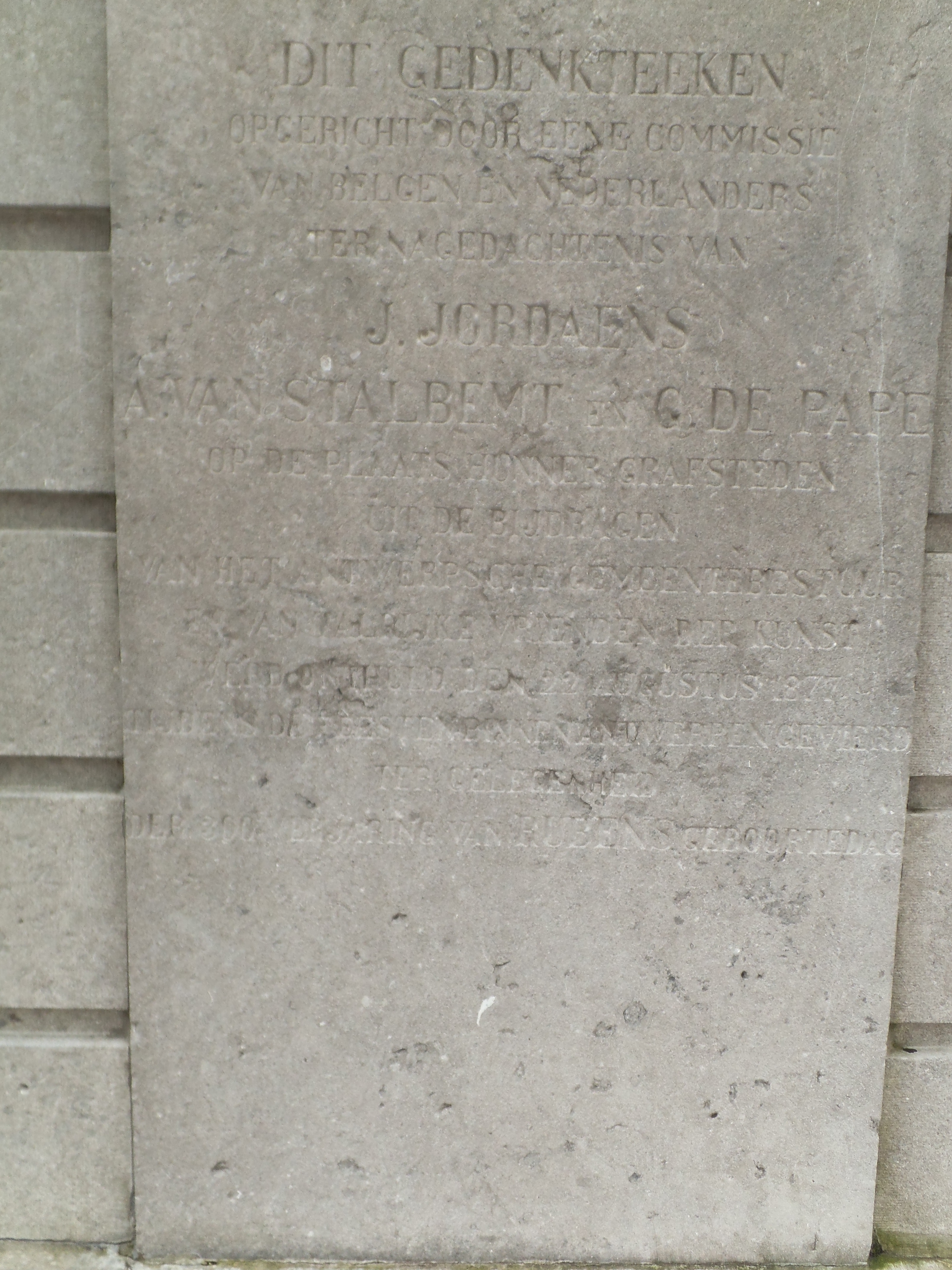 Plaque commémorative du monument de Jacob Jordaens. Jacob Jordaens meurt le 18 octobre 1678, le même jour que sa fille Elisabeth. Comme sa fille, Jordaens fut enterré à Putte, dans la République des Sept Pays-Bas-Unis. Plusieurs protestants y furent enterrés, car le village, situé aux Provinces-Unies, possédait une petite église protestante. À l'emplacement de l'église protestante disparue et du cimetière se dresse, depuis 1877, un monument du sculpteur belge Jef Lambeaux. Dans le piédestal sont encastrées, outre une plaque commémorative, les dalles funéraires des tombes de Jordaens et de ses disciples Van Pape et Van Stalbemt.